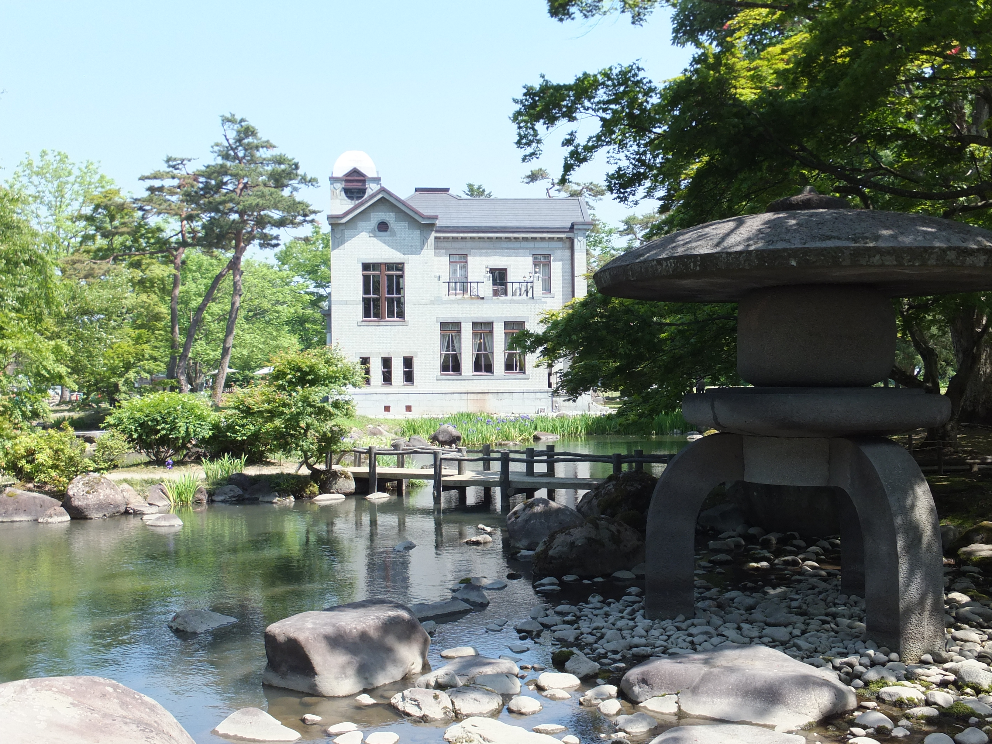 池田氏庭園（秋田県大仙市）の池と洋館